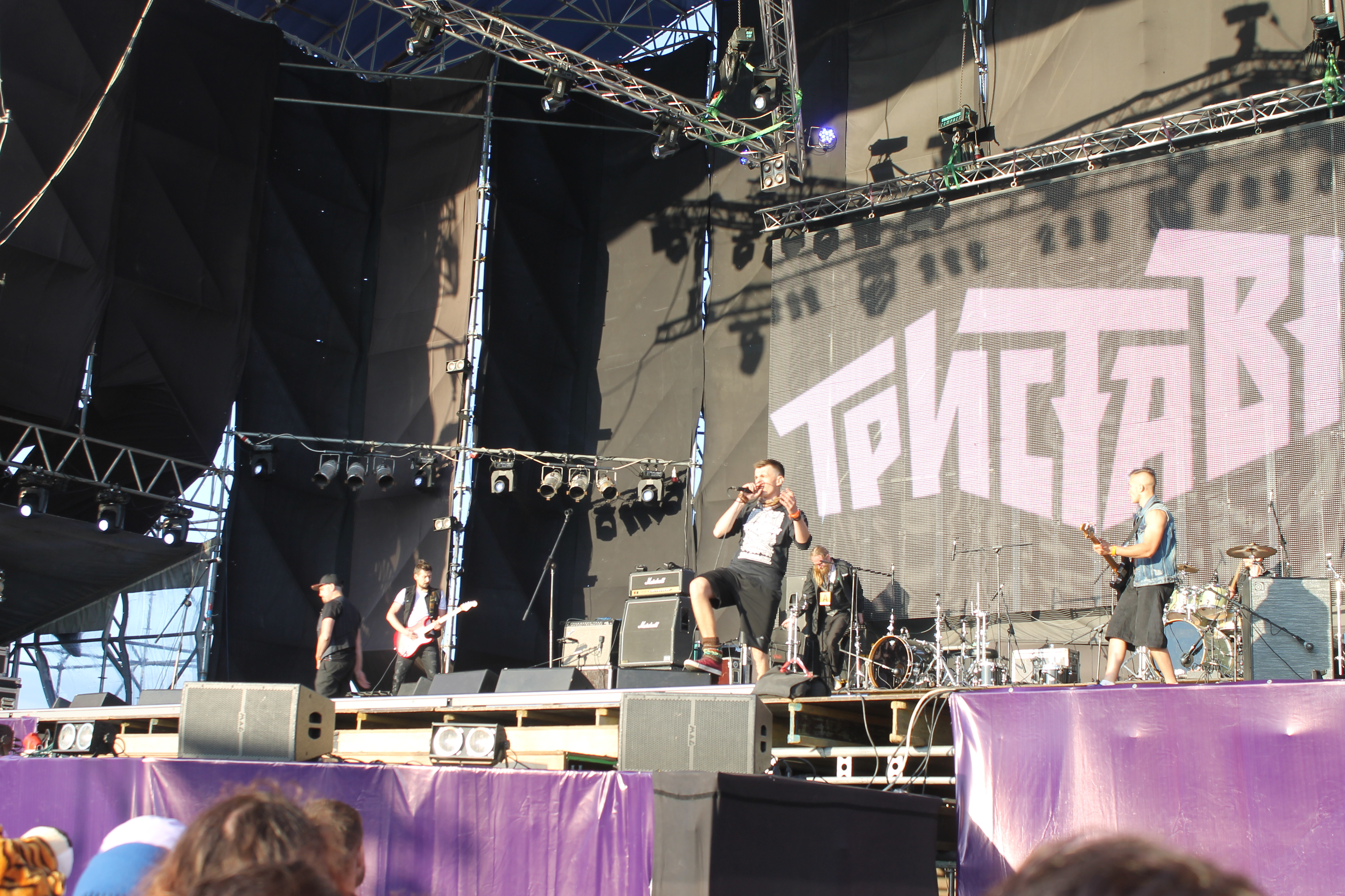 Триставісім на фестивалі. Головна сцена